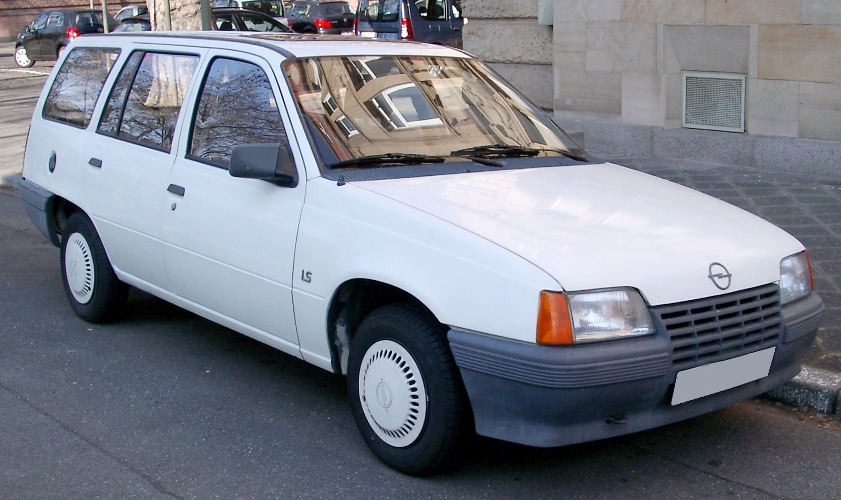 Opel Kadett E Caravan, Vorfacelift